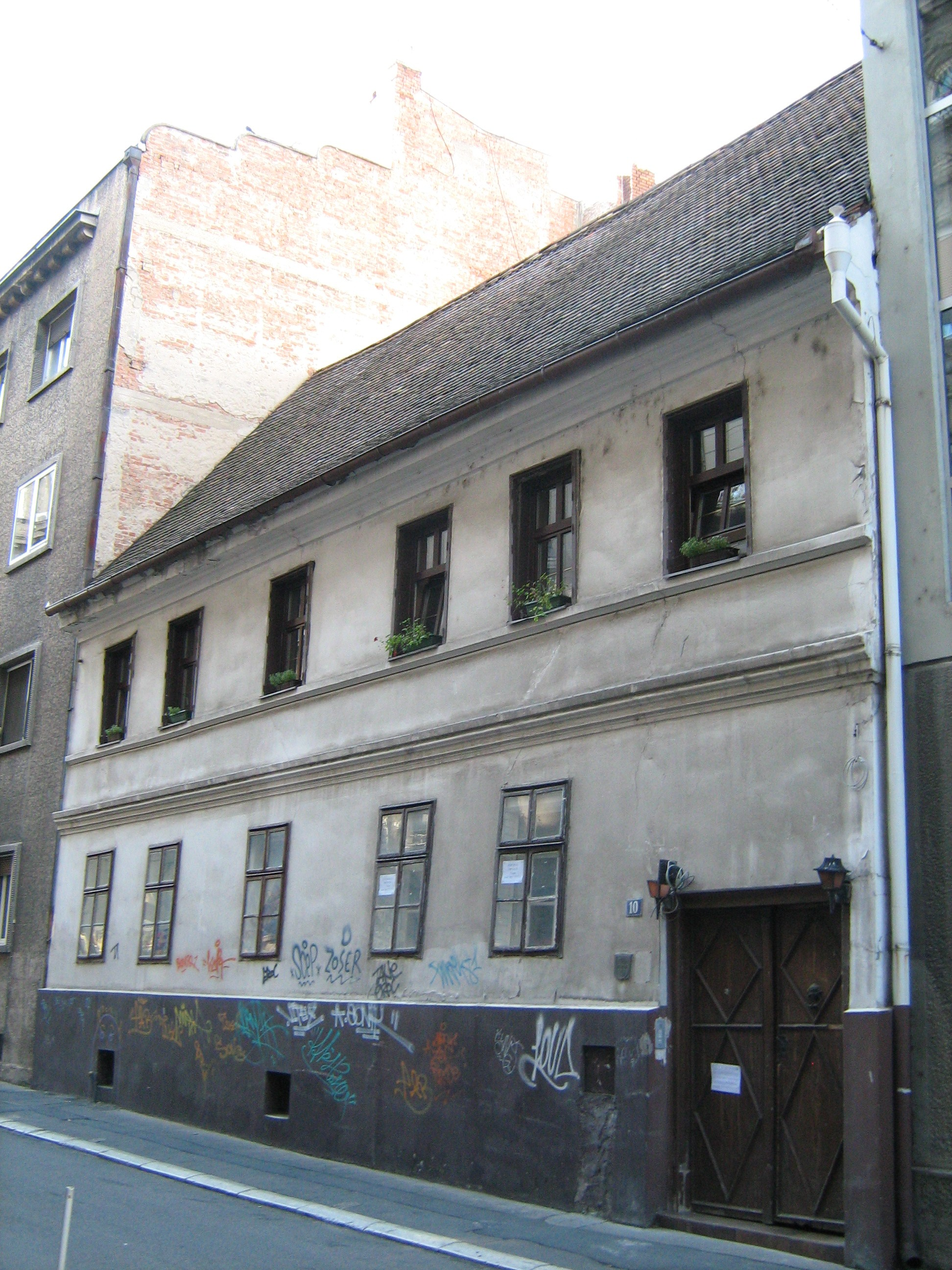 Стара кућа на Варош капији, Грачаничка 10, Београд